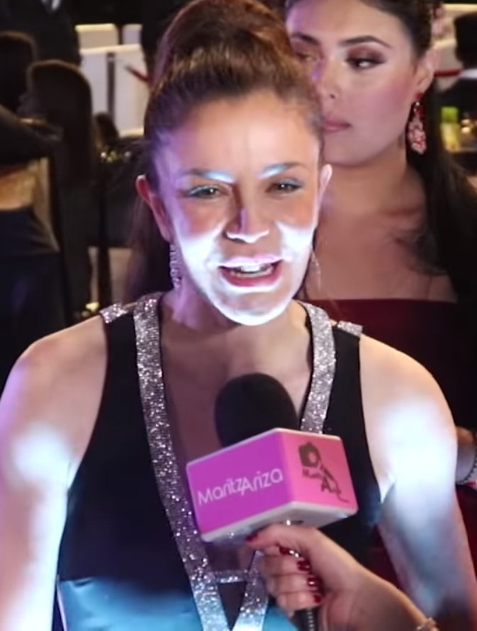 Flora Martínez en la alfombra roja de los Premios TVyNovelas 2018